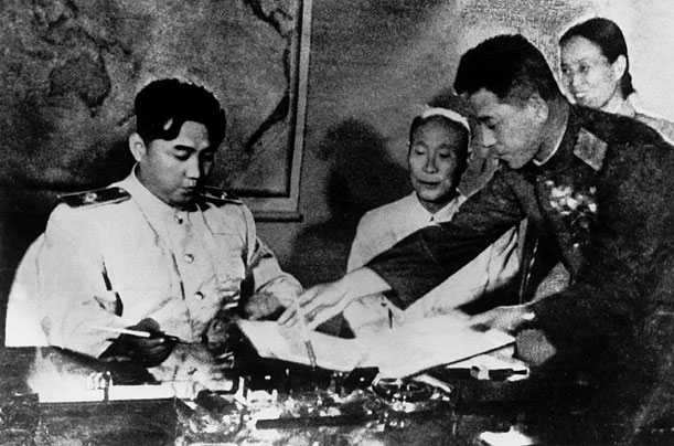 朝鮮戦争停戦協定に署名する金日成